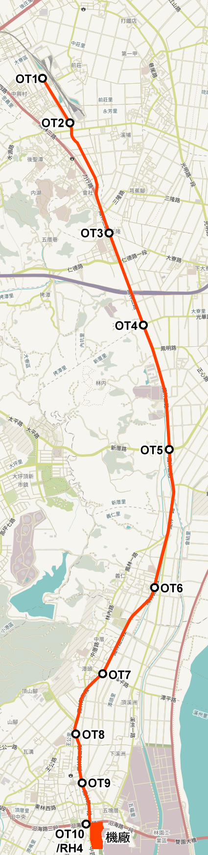 2005年高雄捷運輕軌大寮延伸線的版本